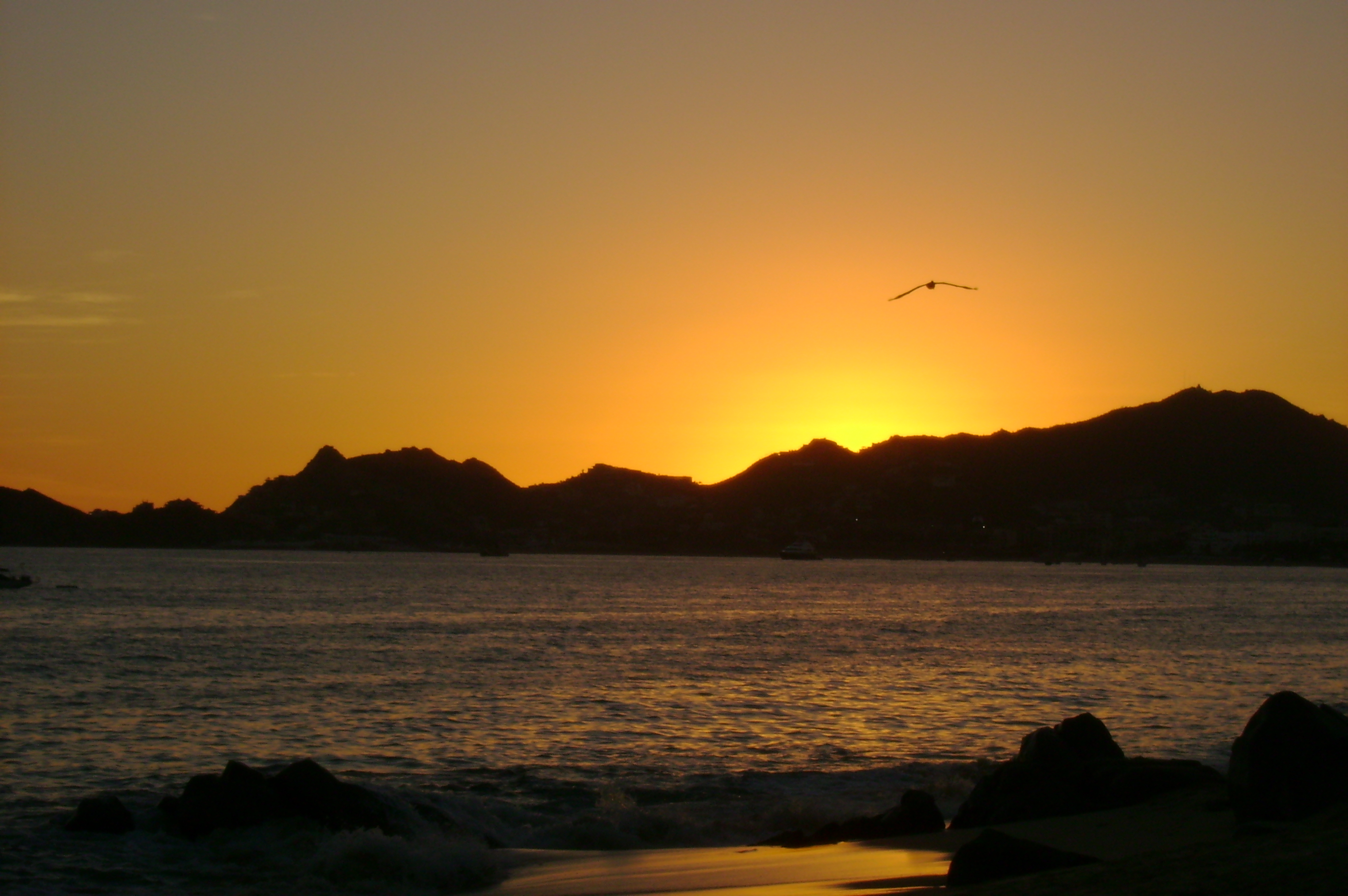 Atardecer en Cabo San Lucas